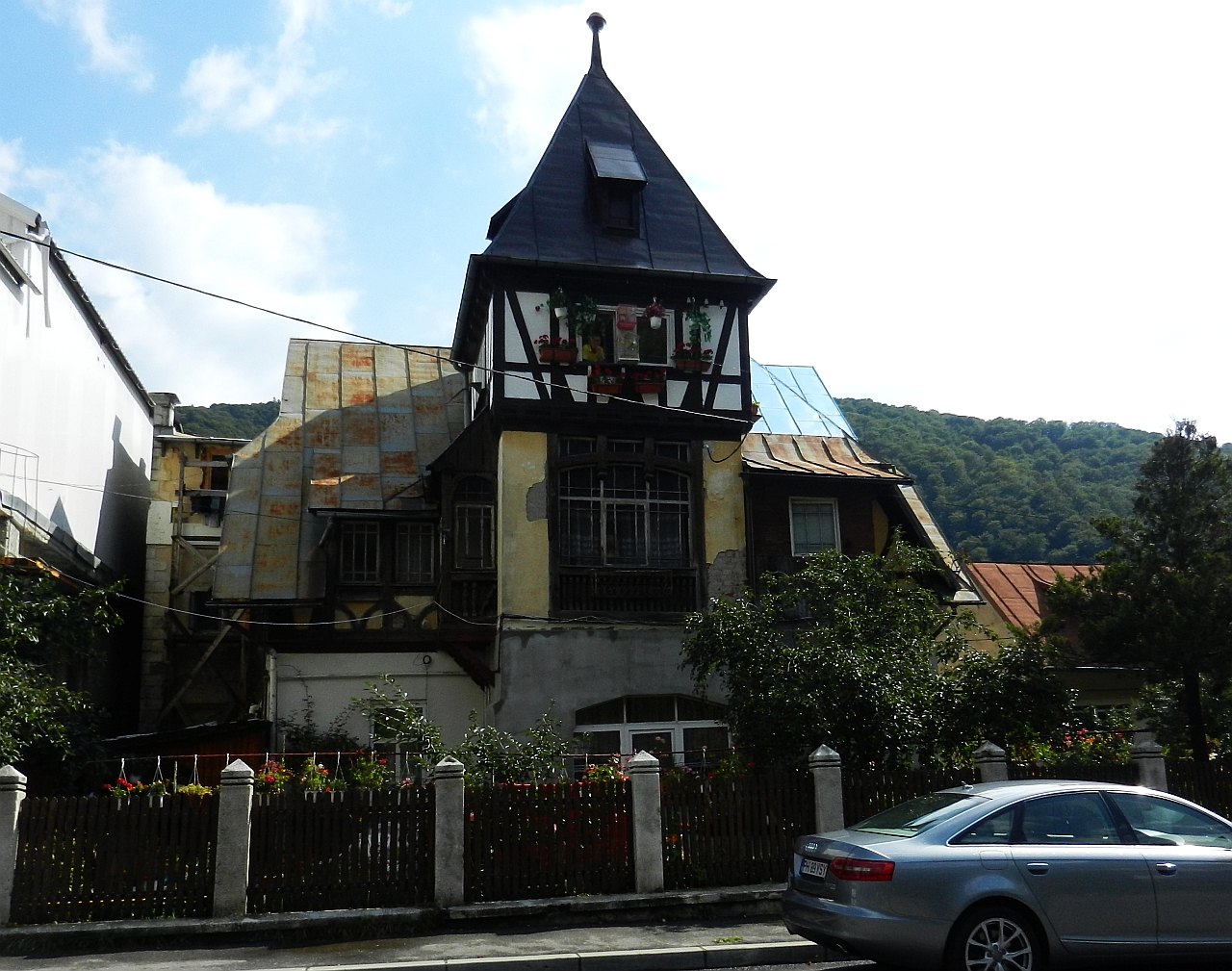 Vila Filippo Dozzi